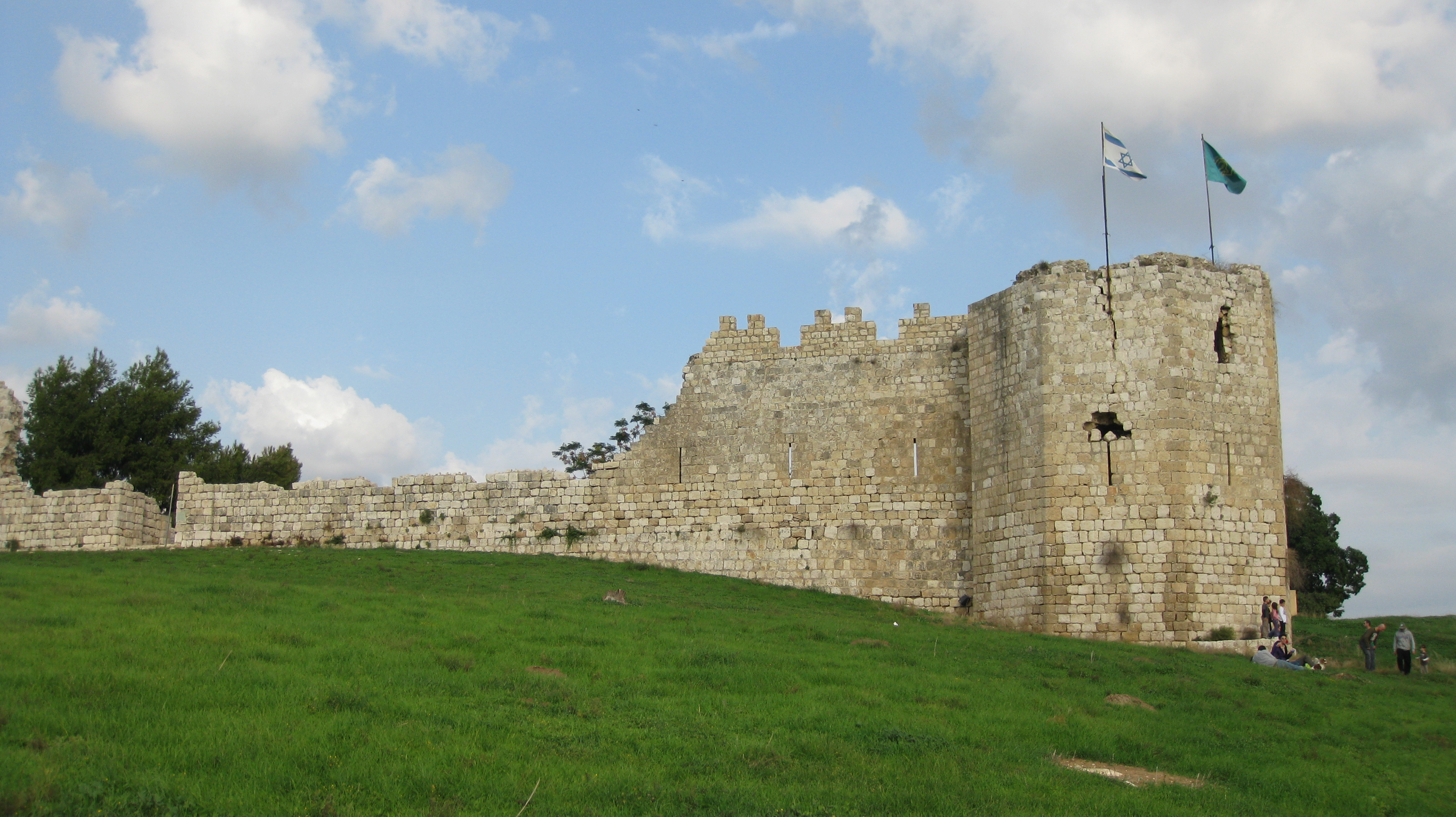 Tel Afek תל אפק גן לאומי ירקון